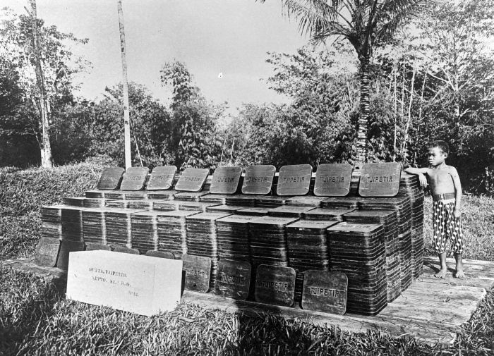 Repronegatif. Produk blok getah perca buatan perusahaan "Tjipetir" (Priangan ).)